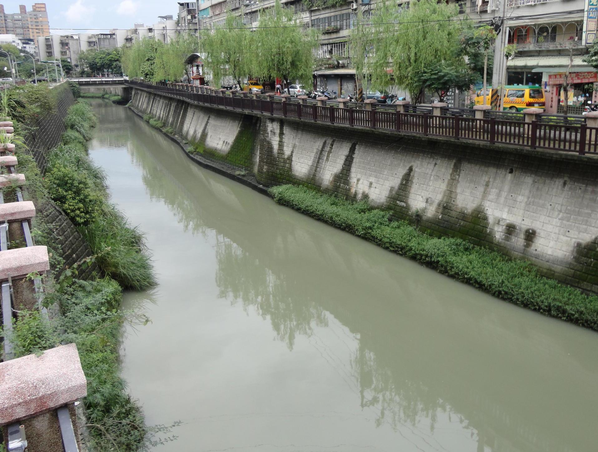 瓦磘溝莊仁橋到名利橋段